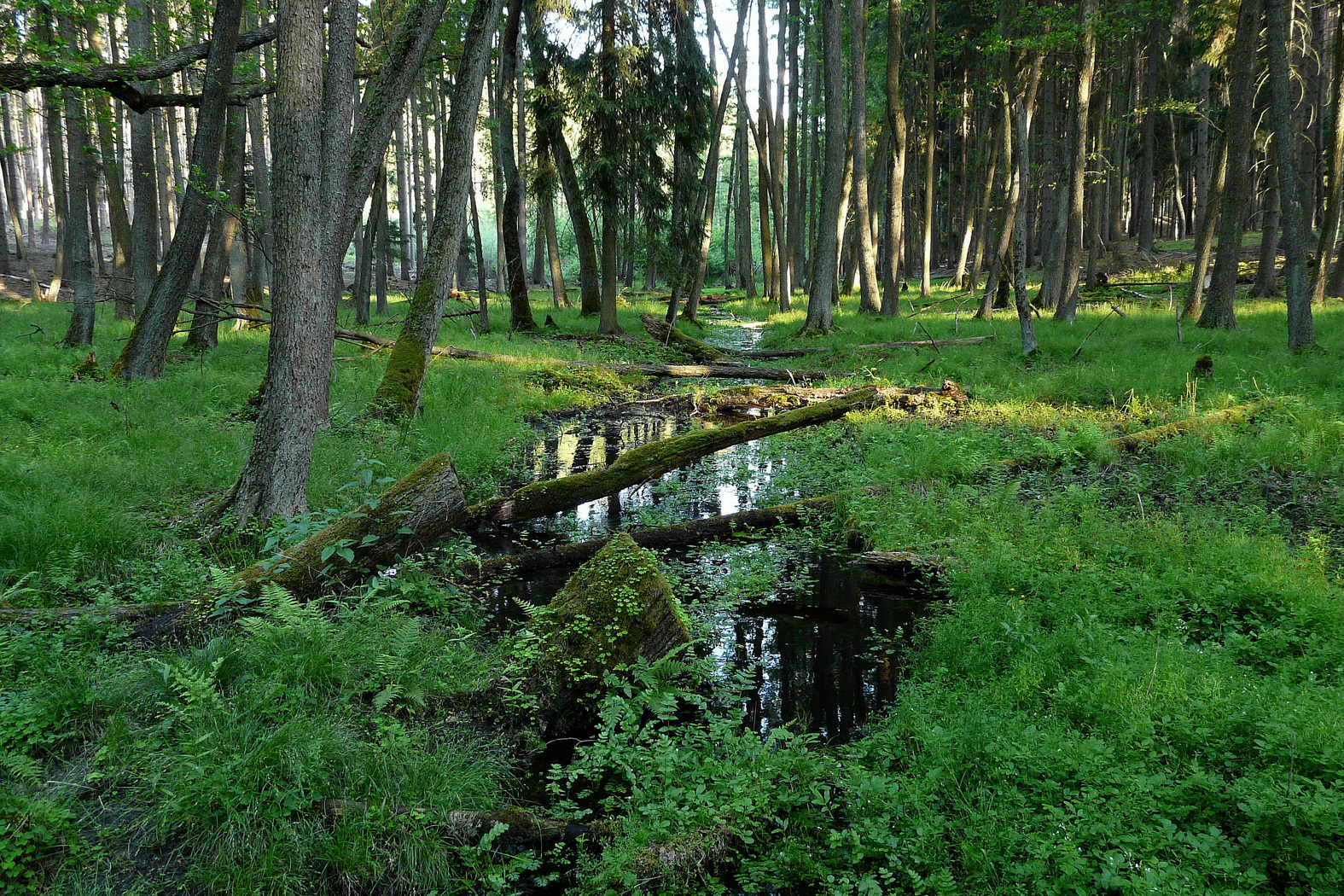 Žehrovský potok (přítok Arnoštického potoka) v oboře Žehrov